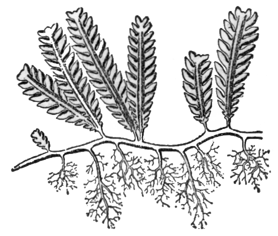 Caulerpa crassifolia (Syn. of Caulerpa mexicana)